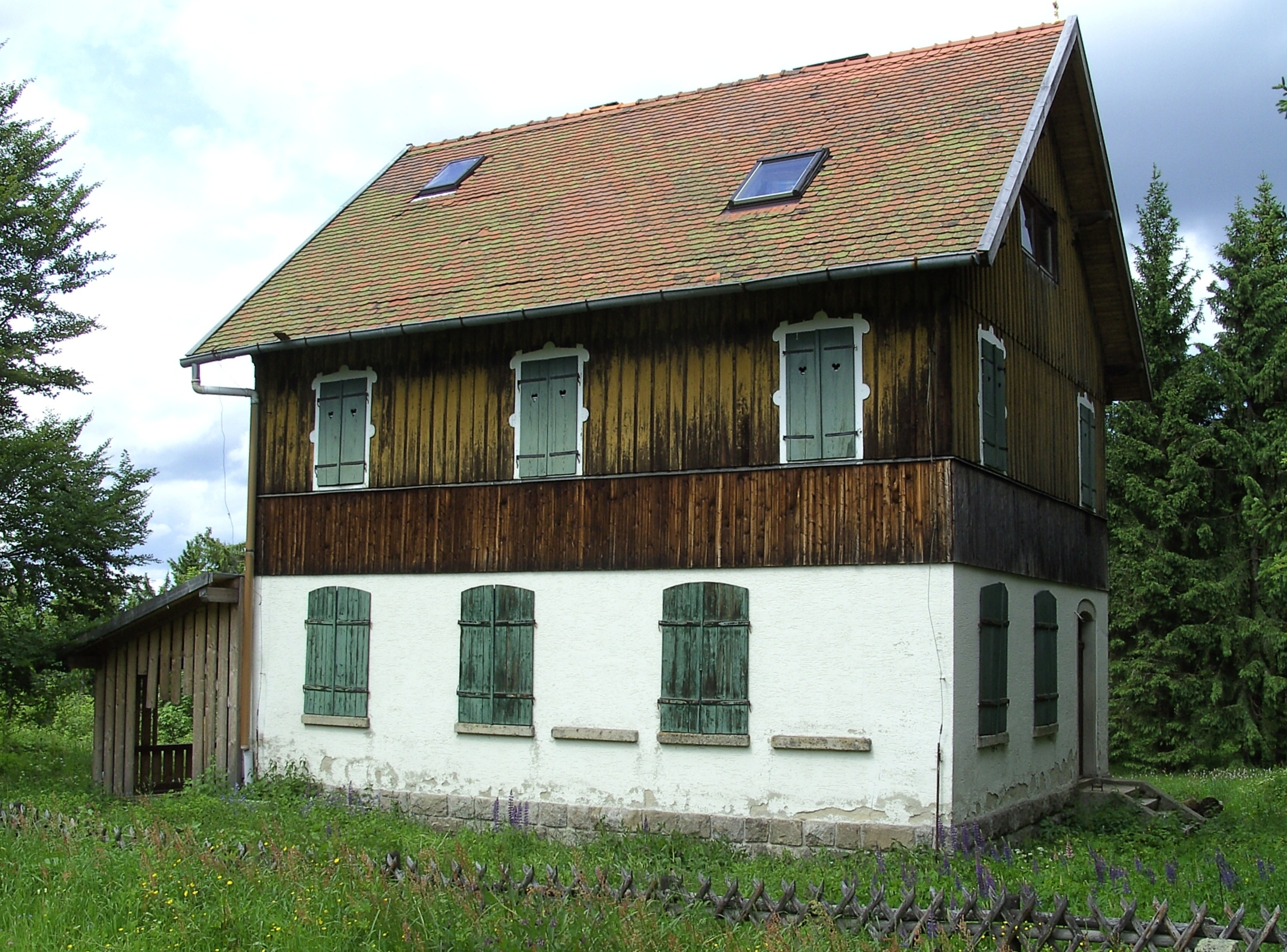 Das ehemalige Schulgebäude von Leopoldsreut. Aufgrund der Dorfwüstung wird das Gebäude nicht mehr genutzt.